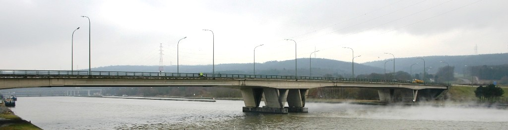 D'Bréck vun Ampsin vum lénksen Uwänner gesinn. Kategorie:Brécken an der Belsch + Kategorie:Brécken iwwer d'Meuse